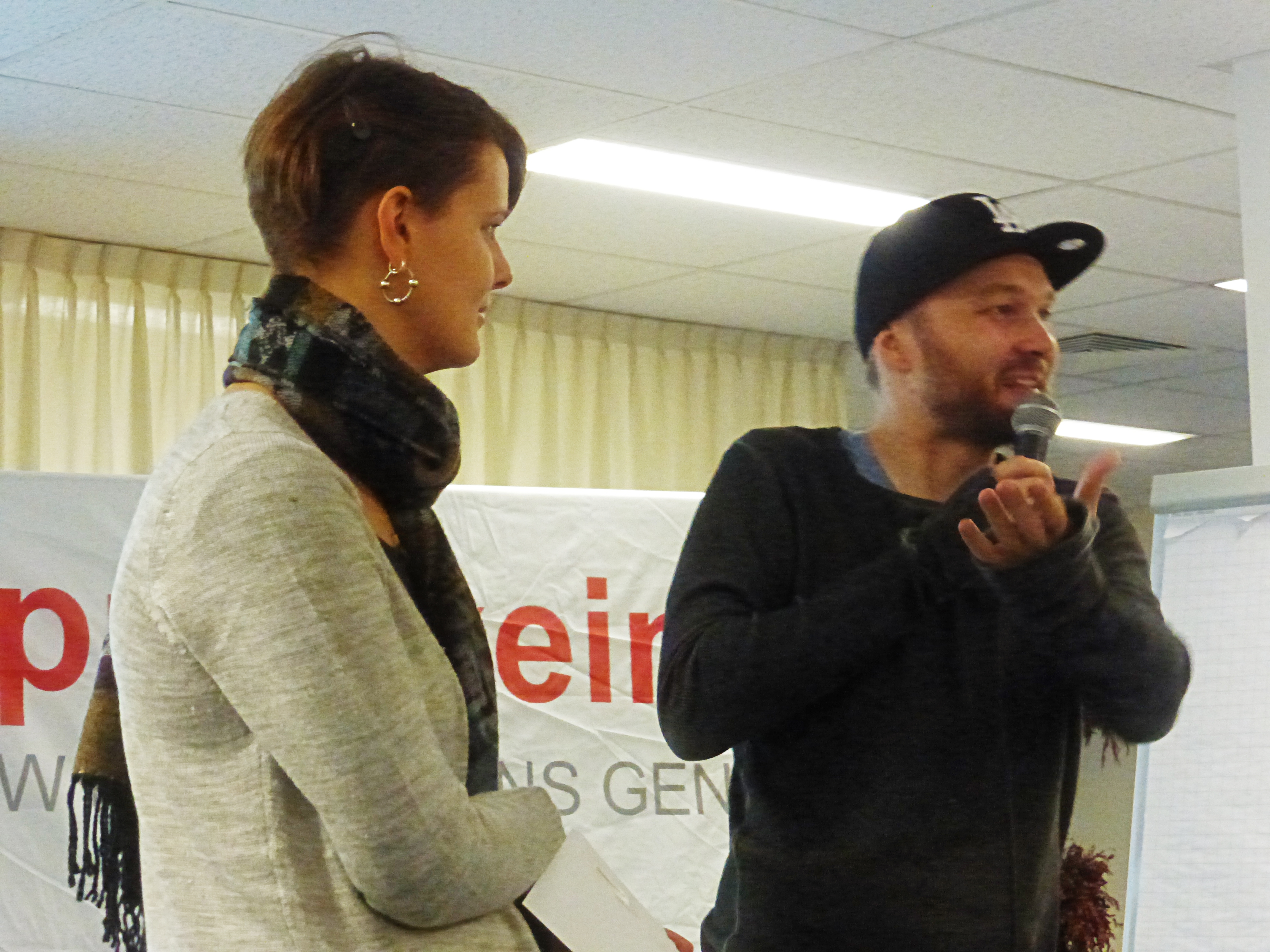 Republikein van het jaar 2014, Joanna van der Hoek overhandigt de prijs aan de Republikein van het jaar 2015, Arjen Lubach.